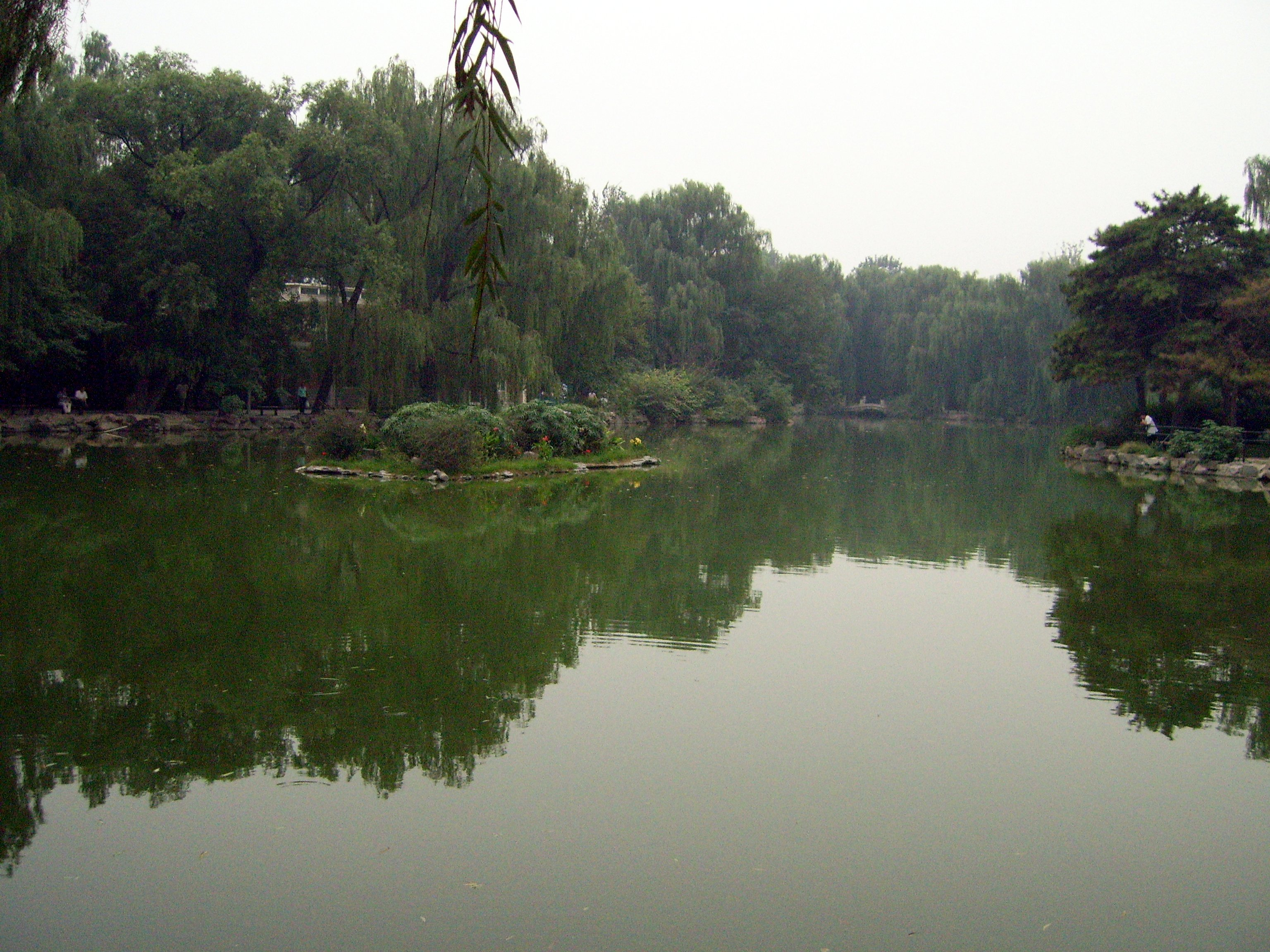 北京动物园的瀛湖